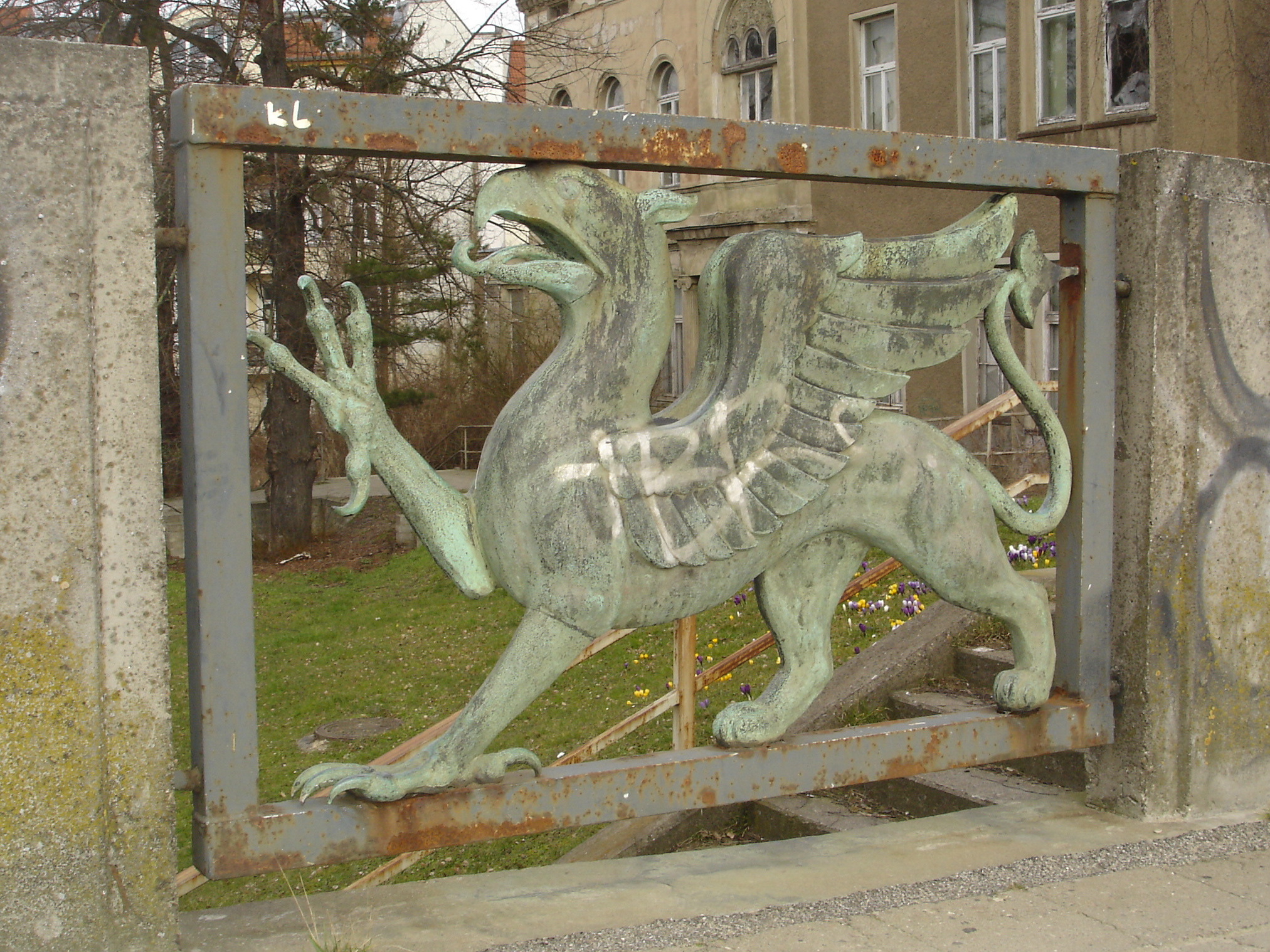 Bronzefigur Ernst-Barlach-Straße Rostock, Greif von Ernst Wossidlo 1930er Jahre